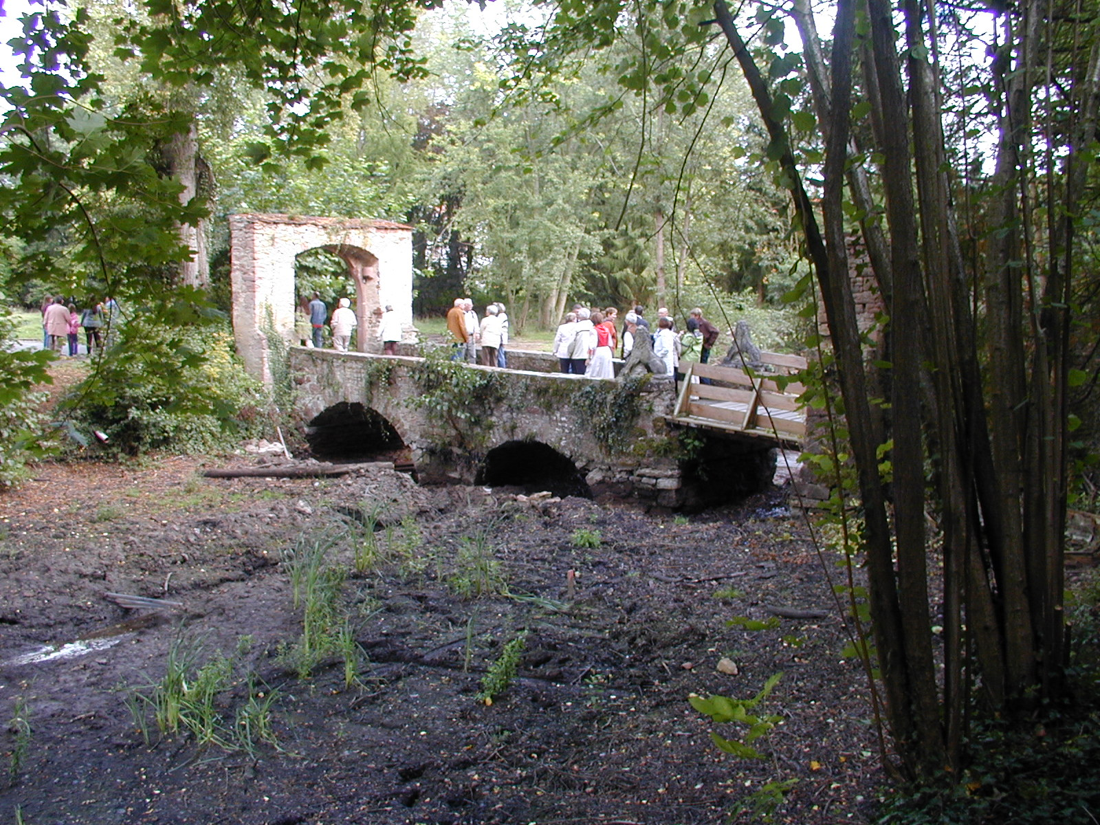 Wasserschloss Sommerau, Zugang über den Wassergraben; dreiteilige Steinbogen- Brücke.